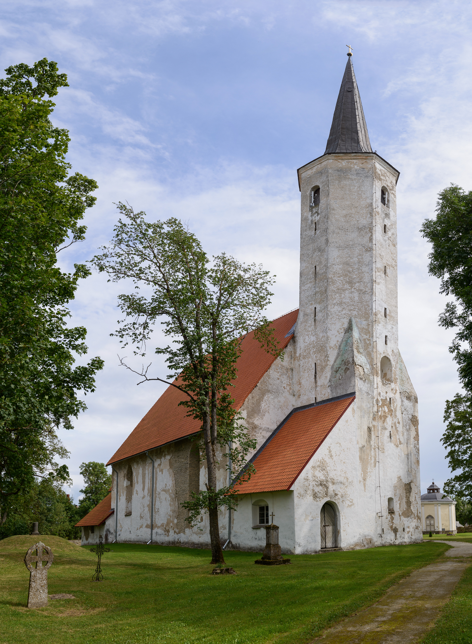 Haljala kirik